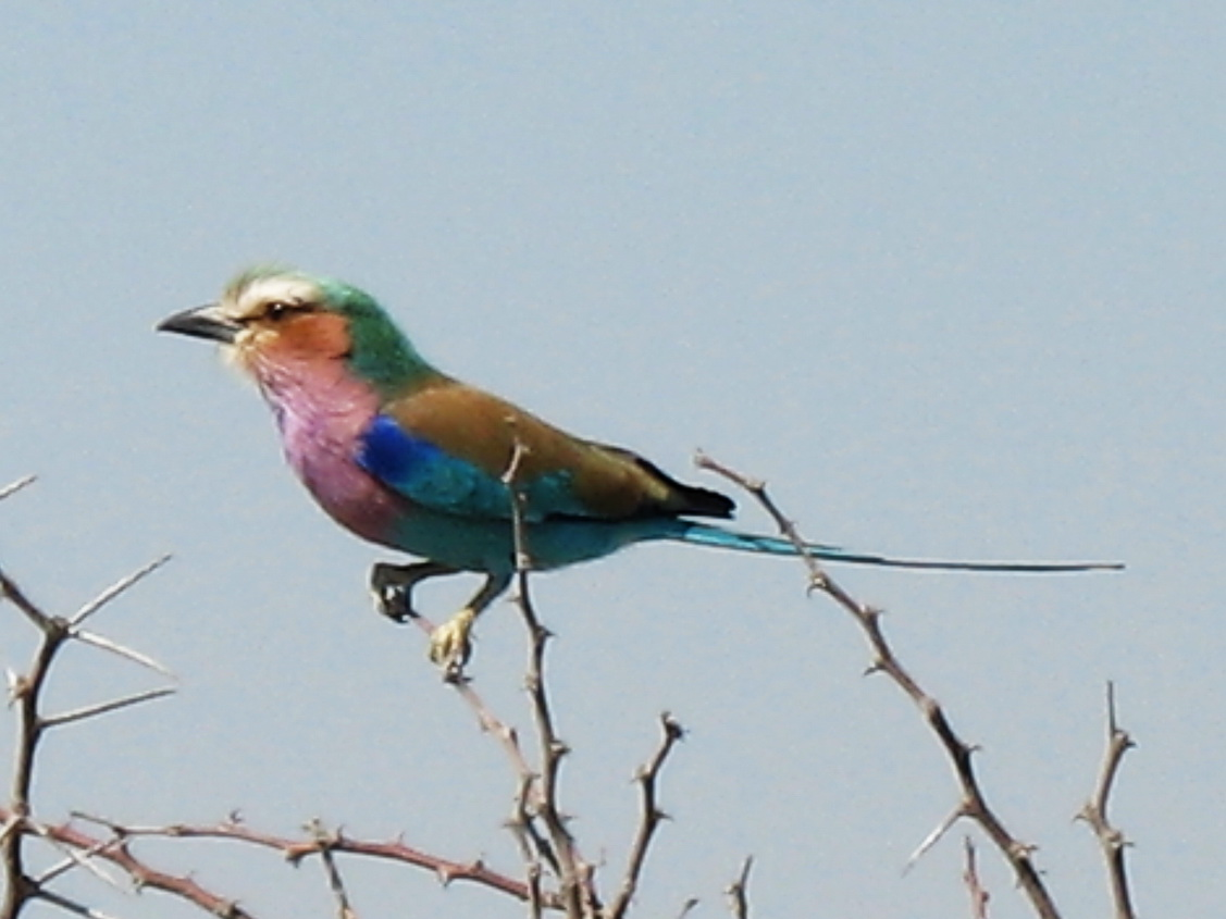 Etosha NP: Gabelracke